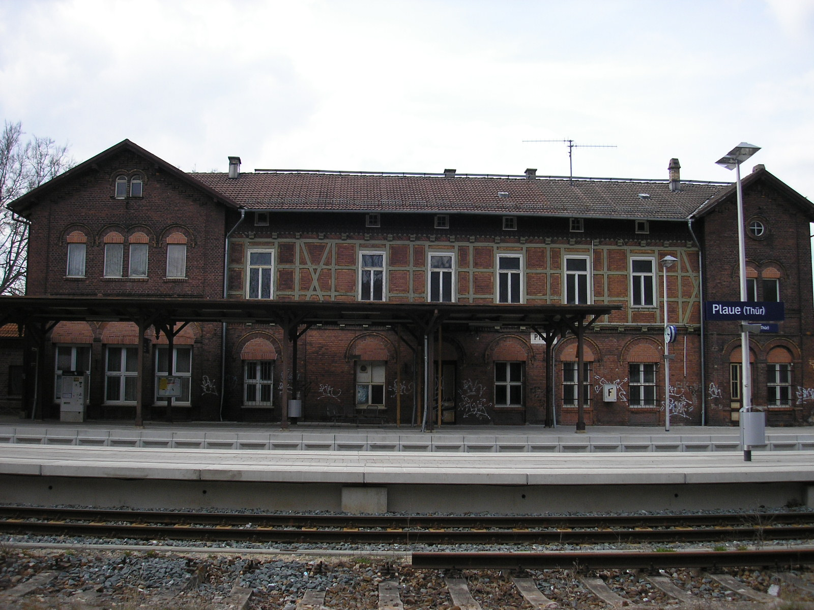 Bahnhof Plaue (Thüringen), gleisseitig.